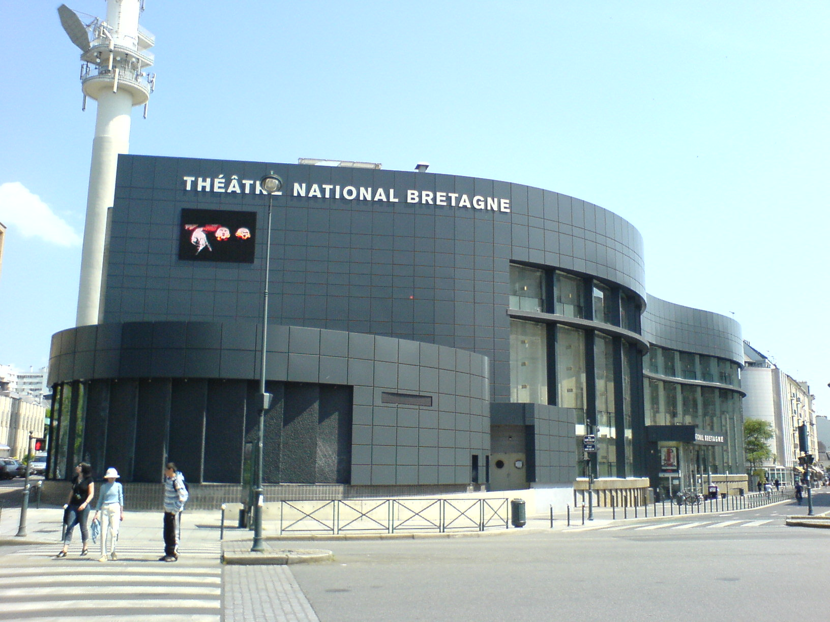 Théatre National de Bretagne